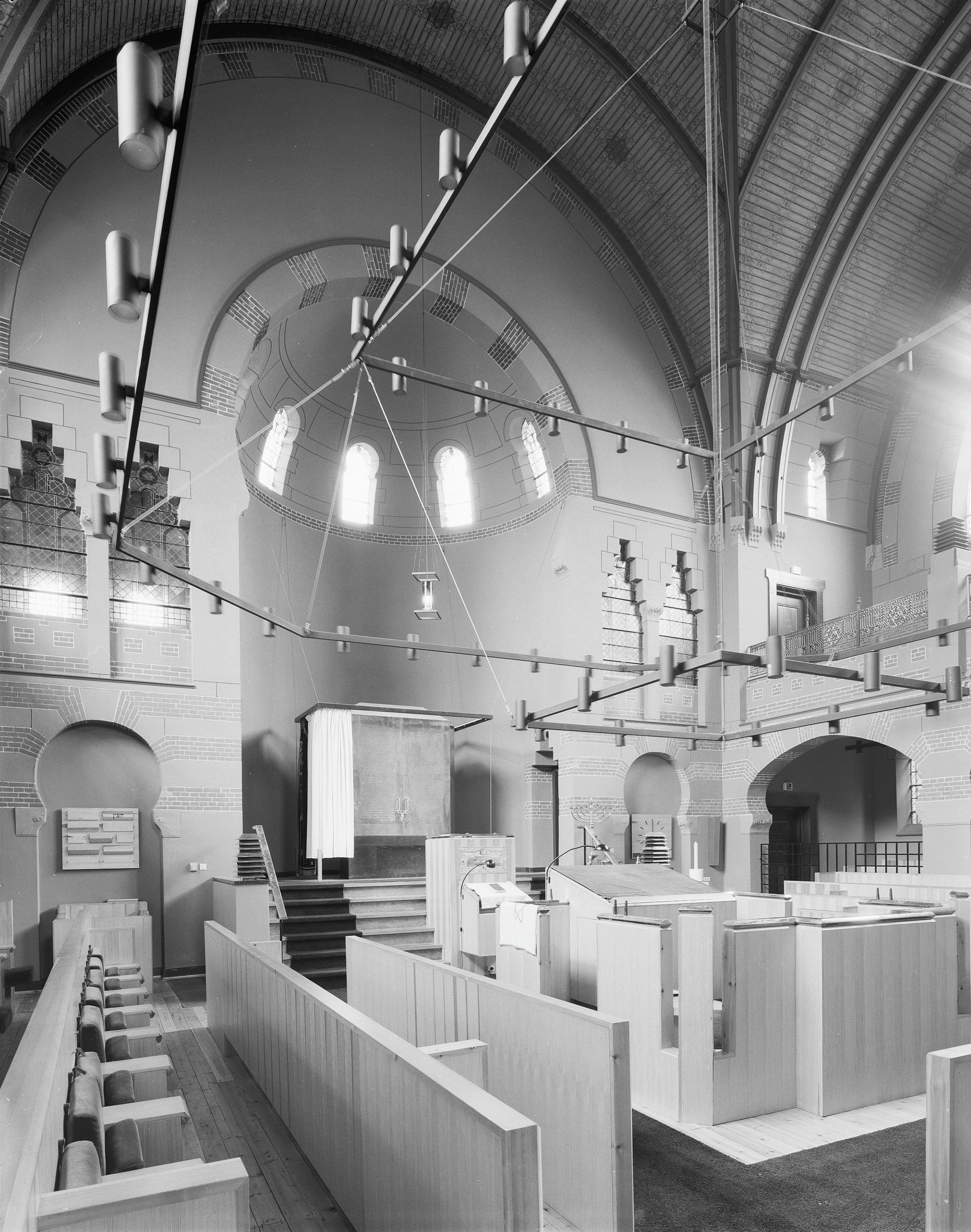 Synagoge: Interieur van de synagoge te Groningen met Heilige Arke